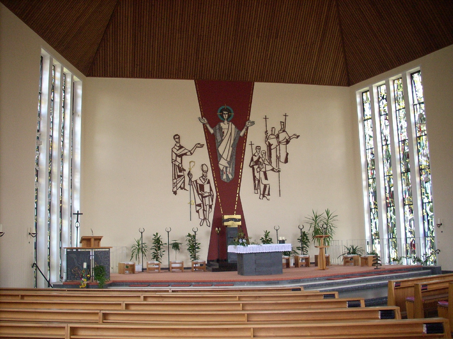 St. Nikolaus Catholic Church, Clausthal-Zellerfeld